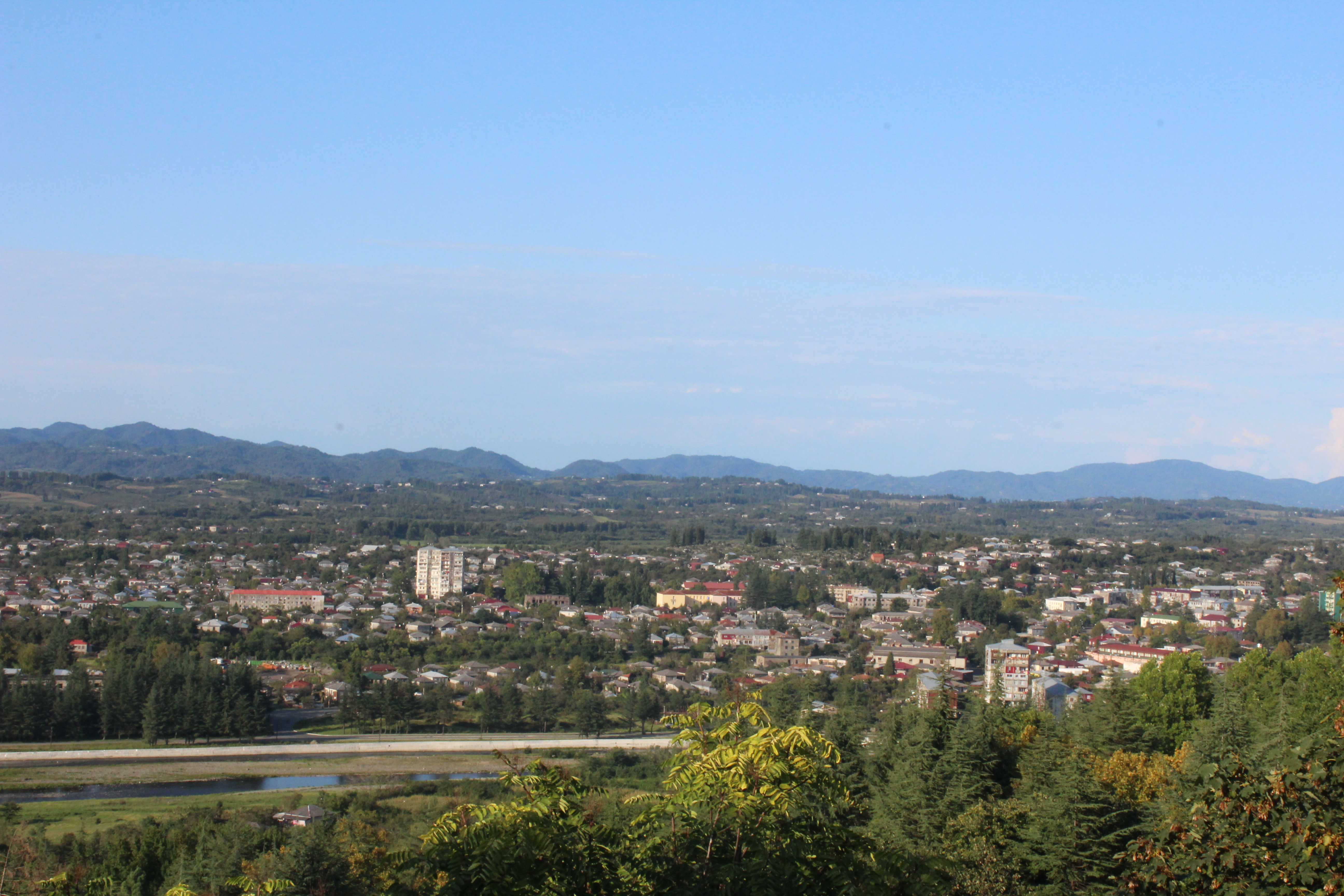 ოზურგეთის ხედი ანასეულიდან